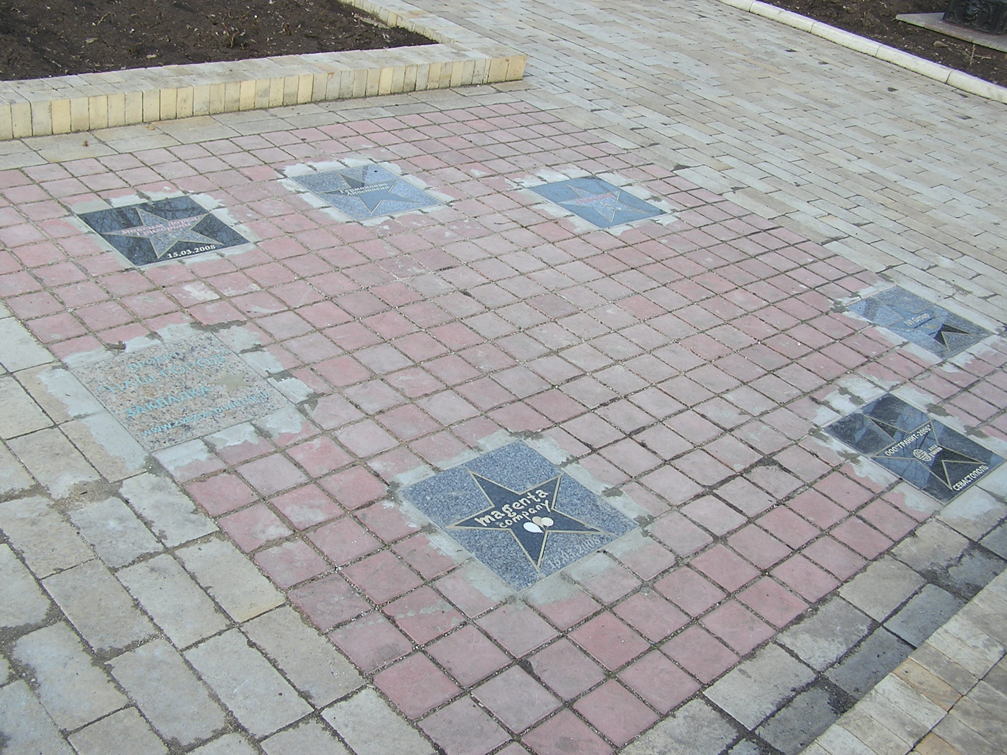 Донецк. Аллея звёзд